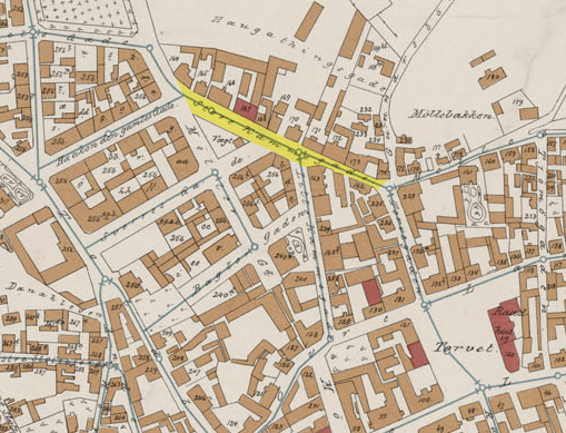 Store Kammegate (Fayes gate) merket gul på et kart over Tønsberg fra 1895. Fra original.